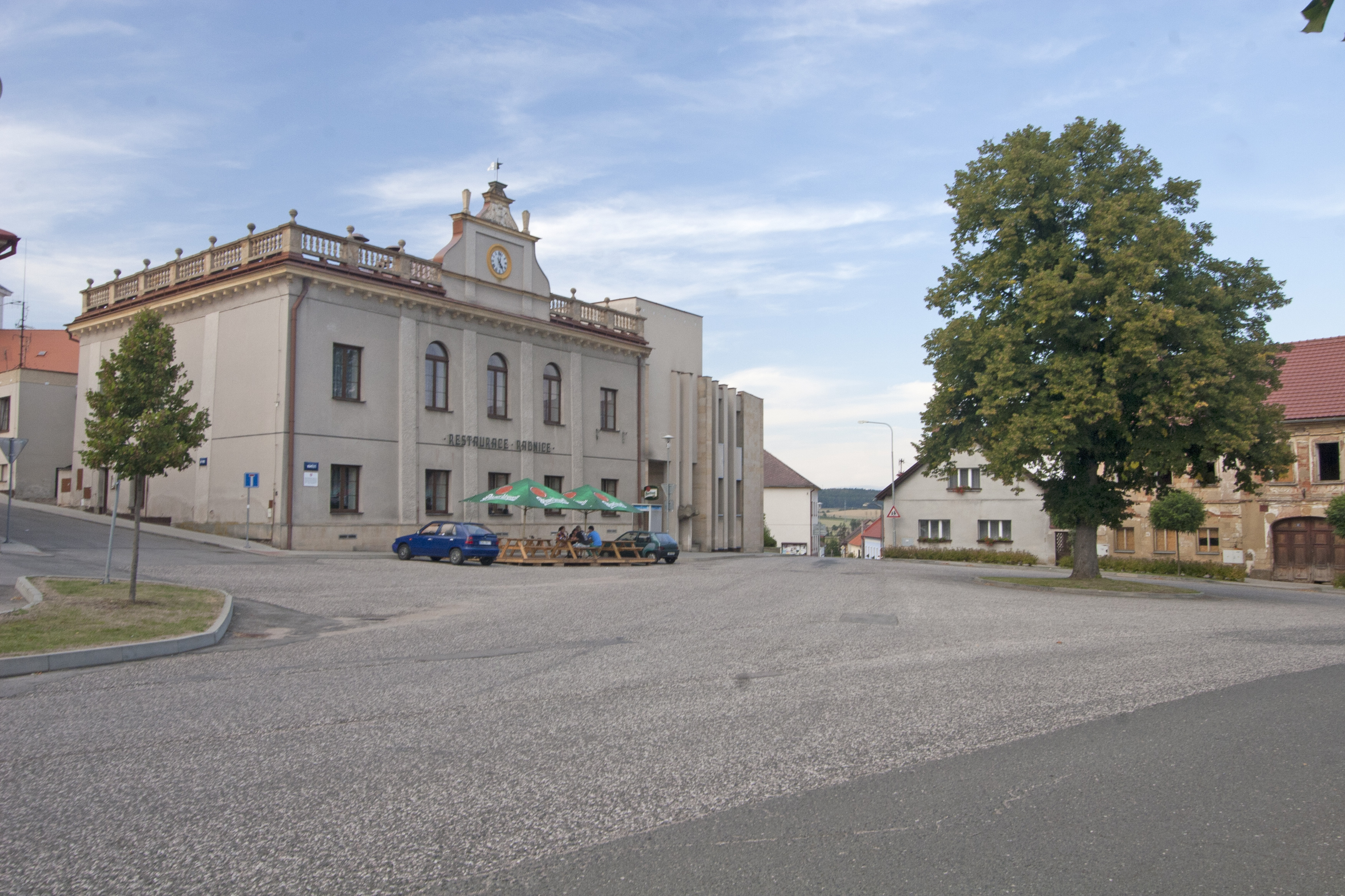 Mlázovice radnice